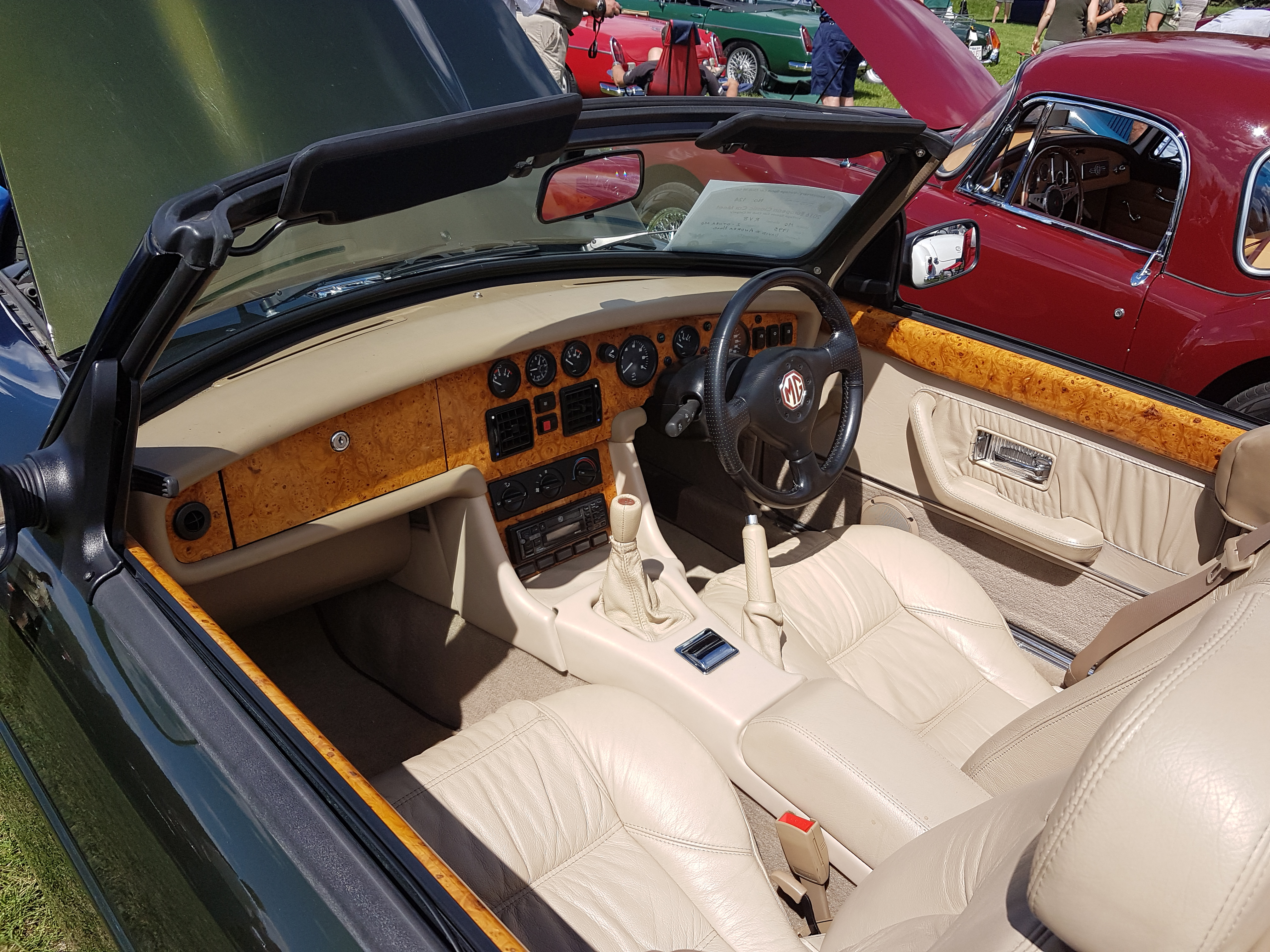 MG RV8 interior